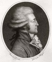 Portrait of Stanislas de Clermont-Tonnerre (1757-1792)